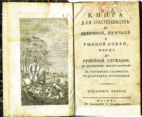 Титульный лист Книги для охотников